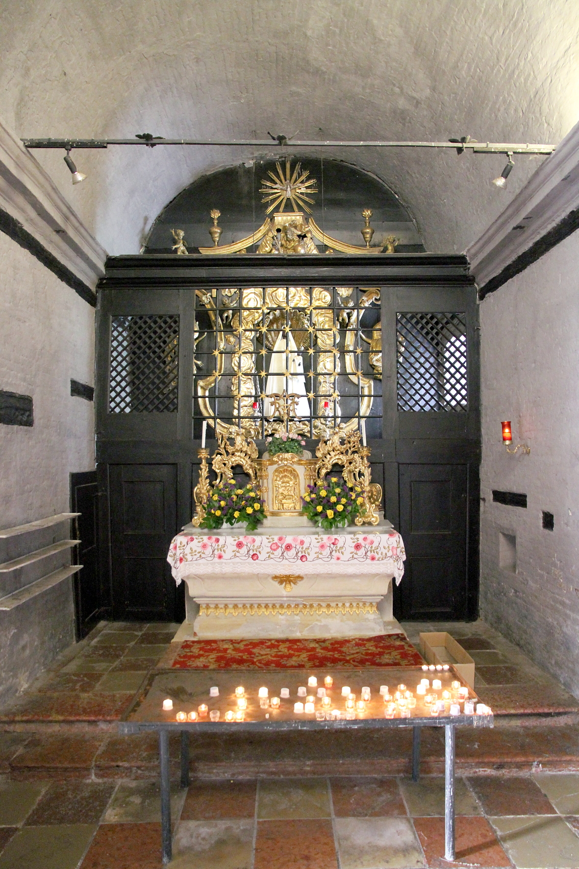 Die Innenansicht der Loretto-(Gnaden-)Kapelle des Klosters in der burgenländischen Marktgemeinde Loretto.